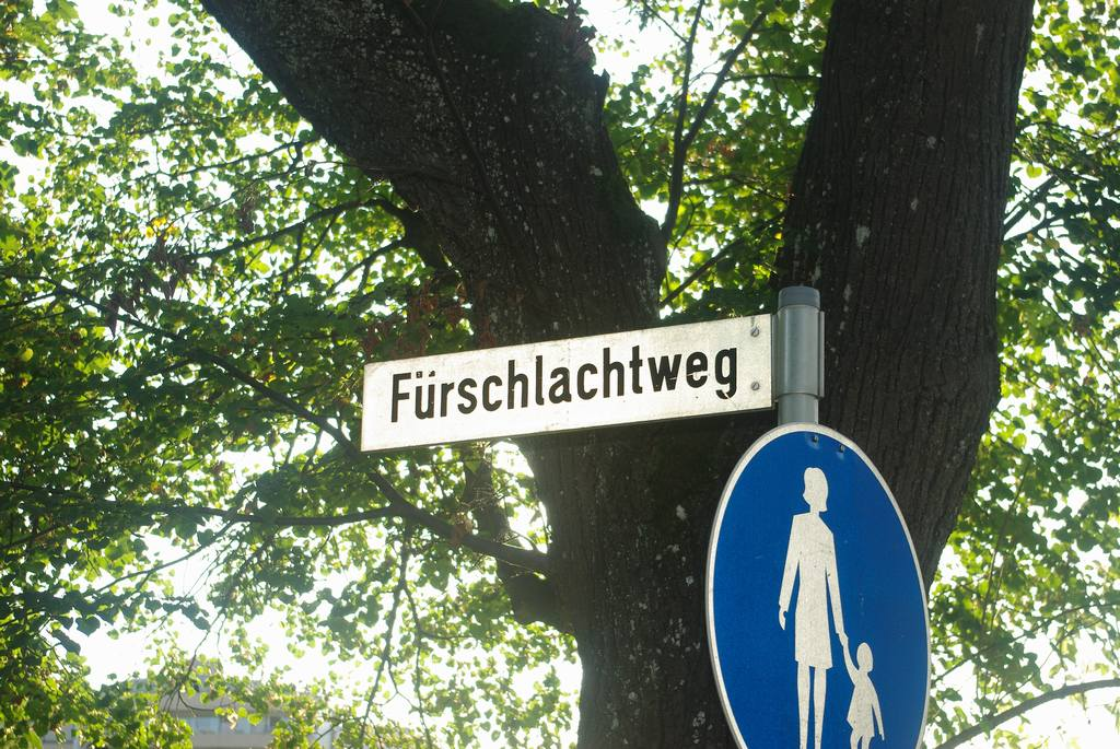 Schild am Fürschlachtweg in 83435 Bad Reichenhall